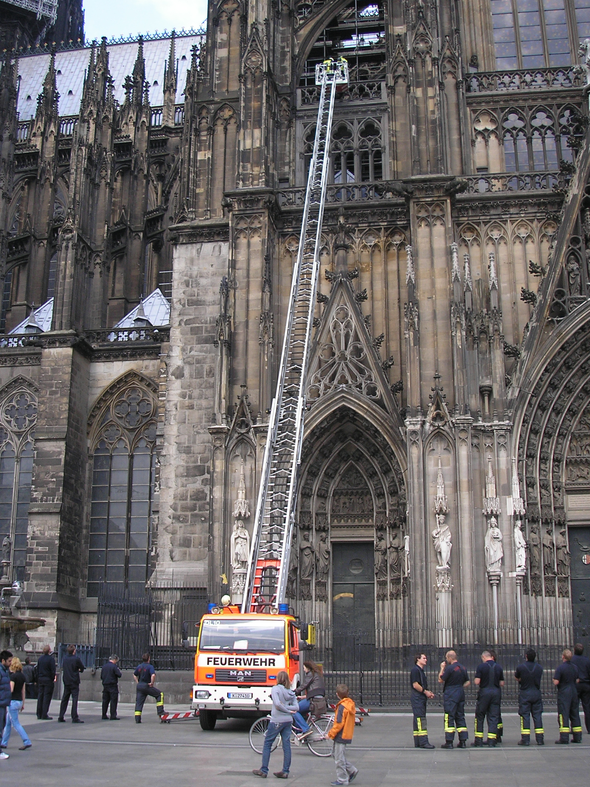 Leiterübung der Berufsfeuerwehr Köln am Dom.